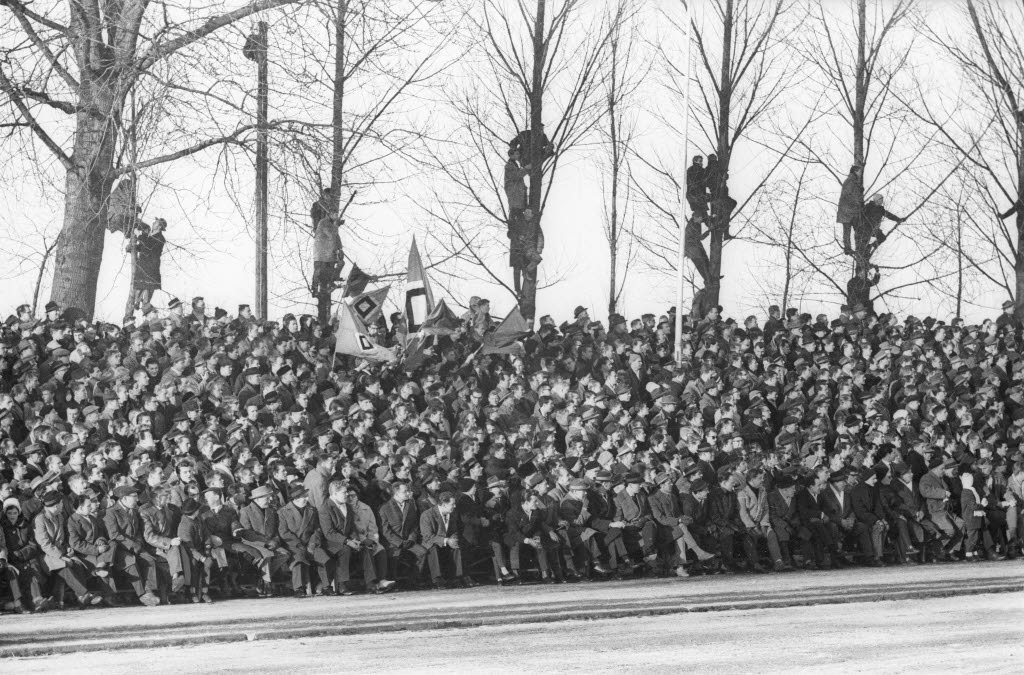 im Holsteinstadion vor 17.000 Zuschauern.